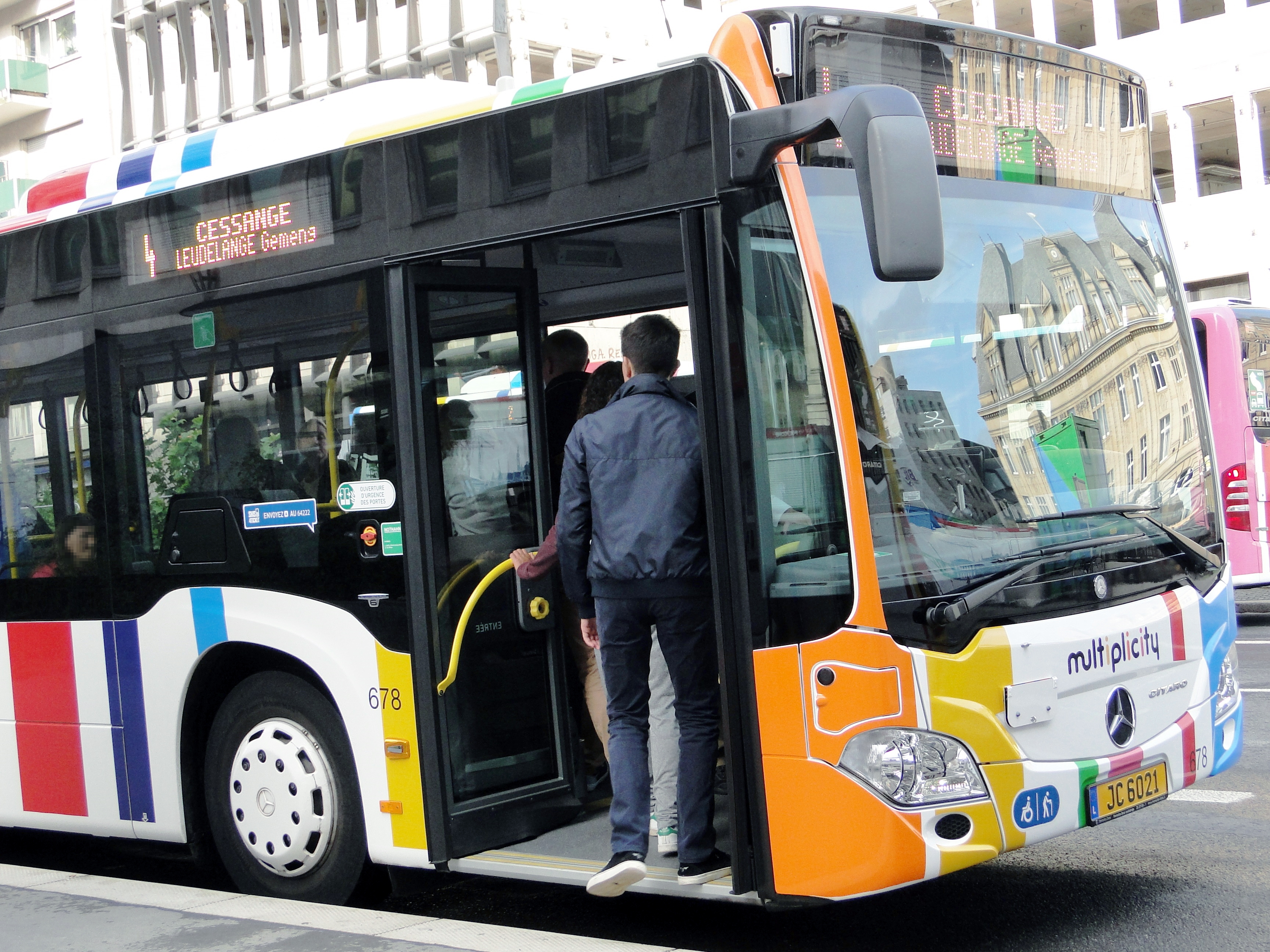 Bus CLEMENT-AVL #678 (JC6021). Marque: Mercedes Um Boulevard Royal (Hamilius quai 2) op der Linn 4 Richtung "Leudelange, Gemeng".